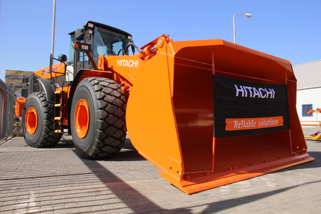 יעה אופני מדגם HITACHI ZW310-5B